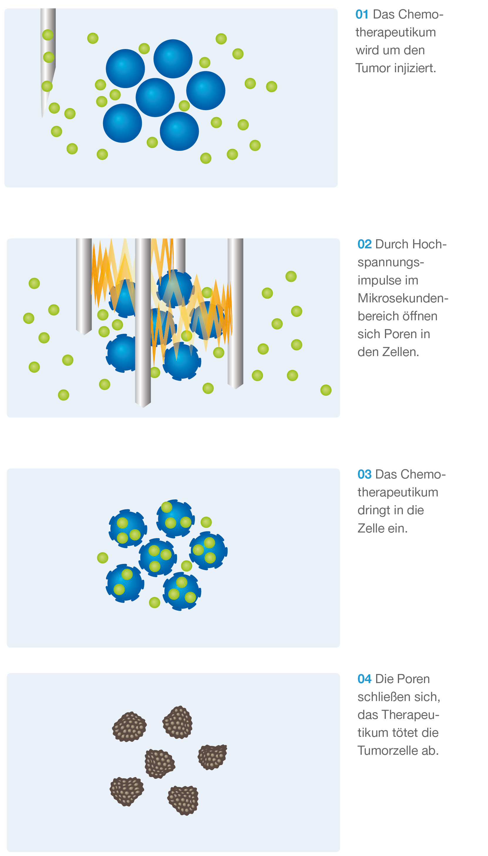 Illustration zur Veranschaulichung der Anwendung der ECT